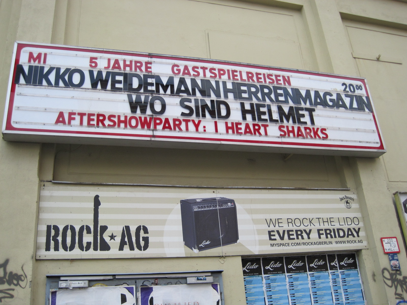 Ankündigung des Wo sind Helmet Konzerts in Berlin